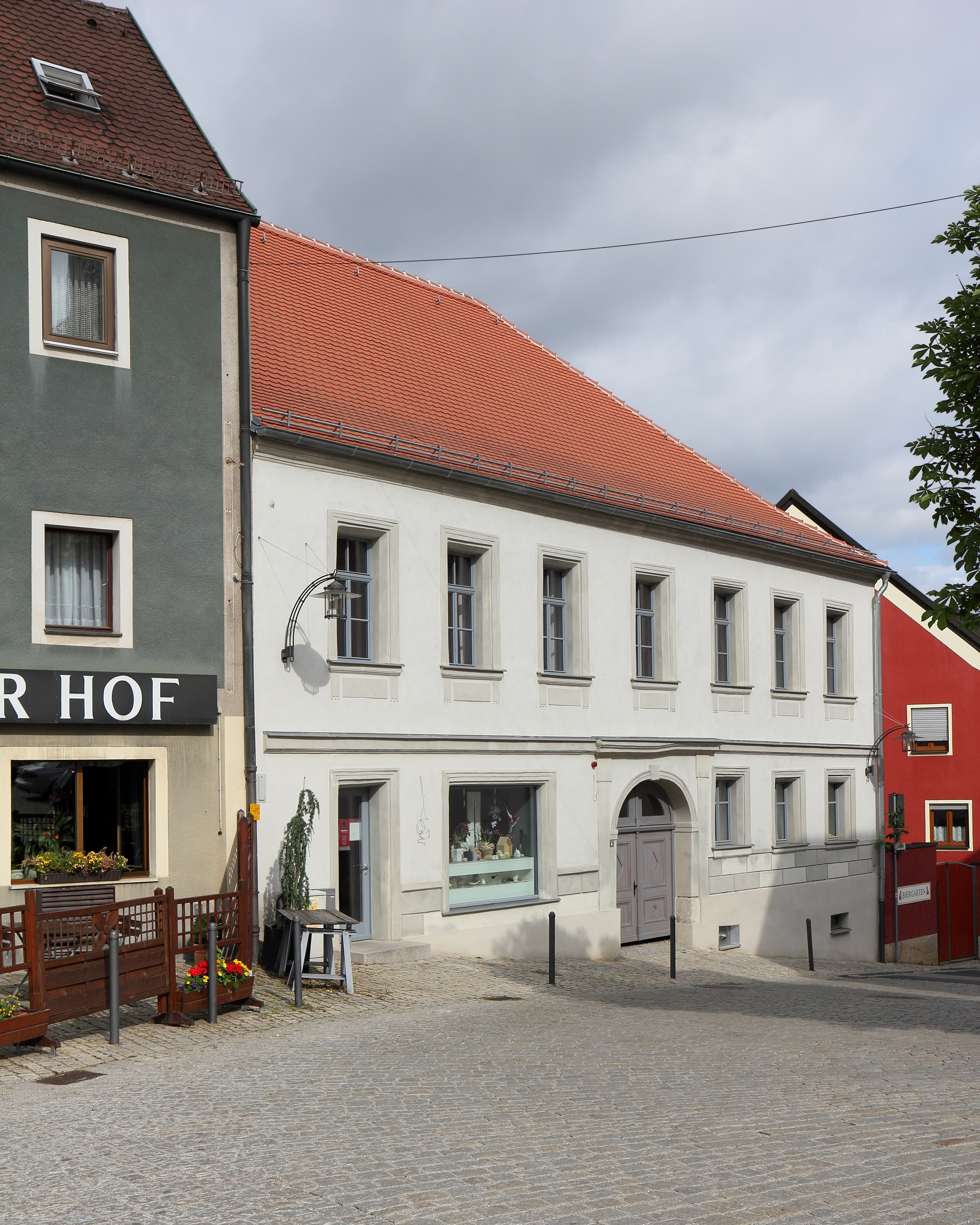 Sulzbach-Rosenberg - Luitpoldplatz 16 - Ackerbürgerhaus. Klassizistisch, 19. Jahrhundert.